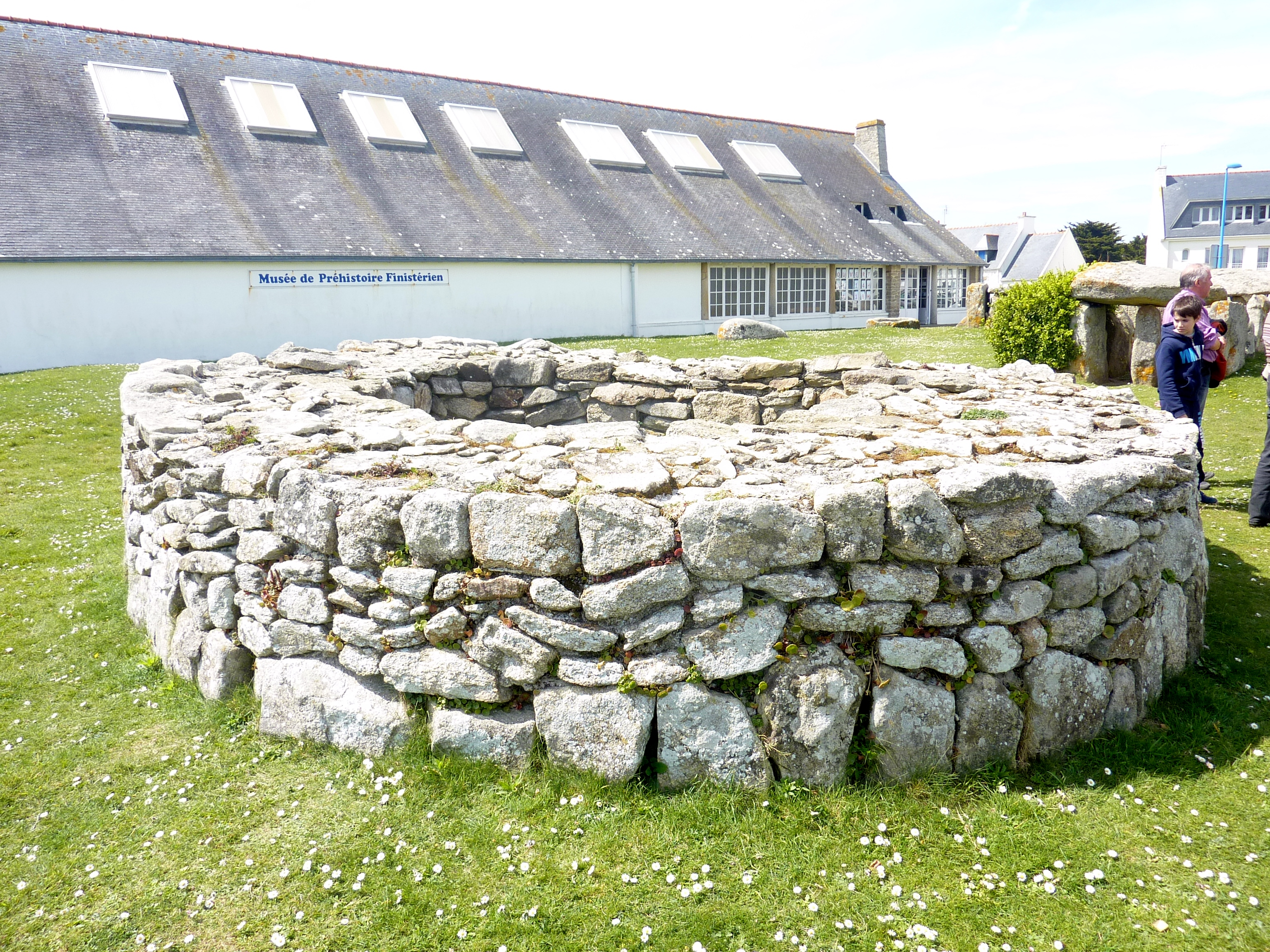 Tumulus circulaire en pierre, initialement recouvert d'un tertre de terre et au milieu duquel se trouvait une sépulture. Datant de l'âge du bronze, il provient de Kerhuel en Saint-Évarzec et réimplanté au Musée de la préhistoie finistérienne de Penmarch.